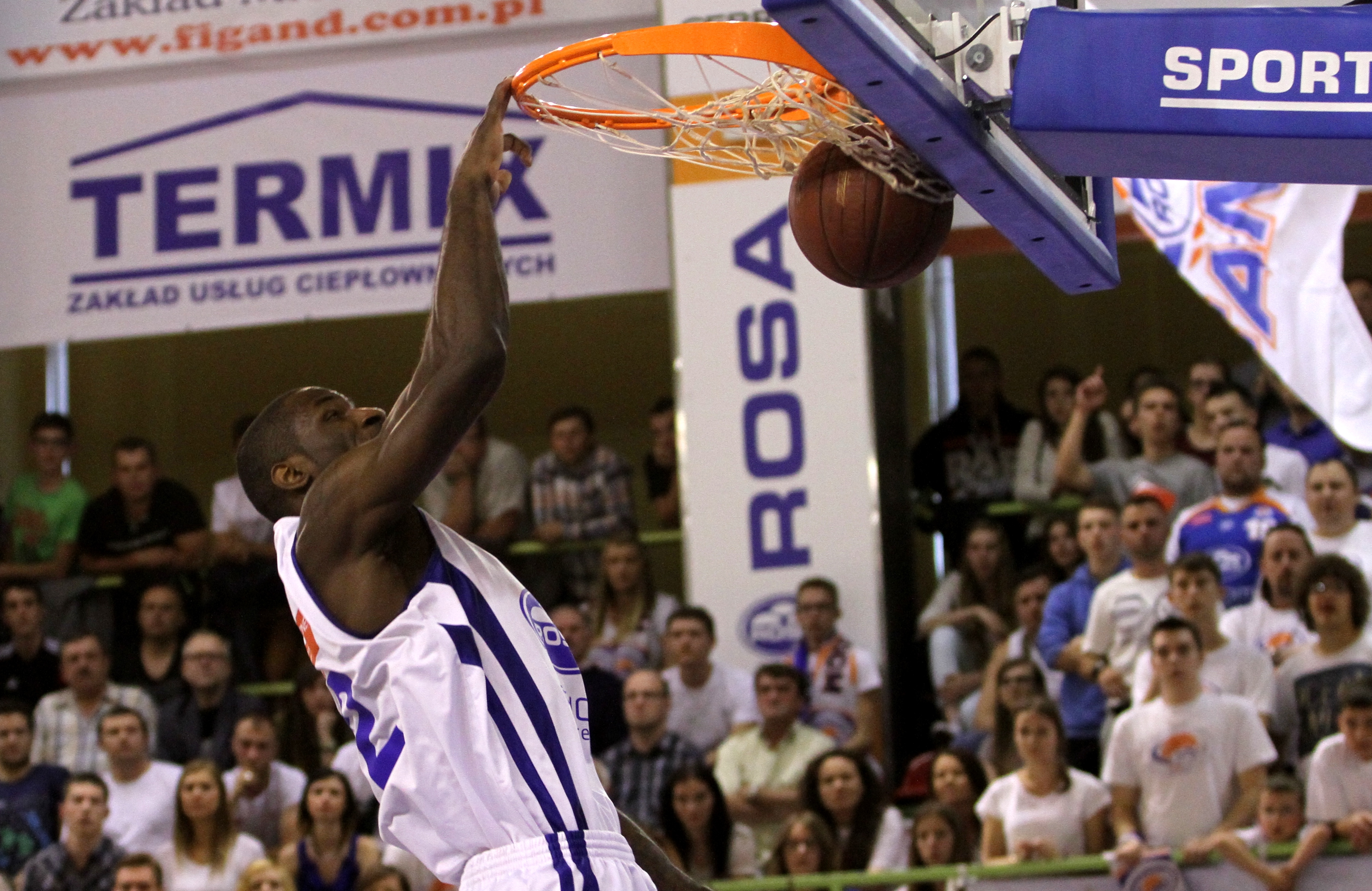 Kim Adams Rosa Radom